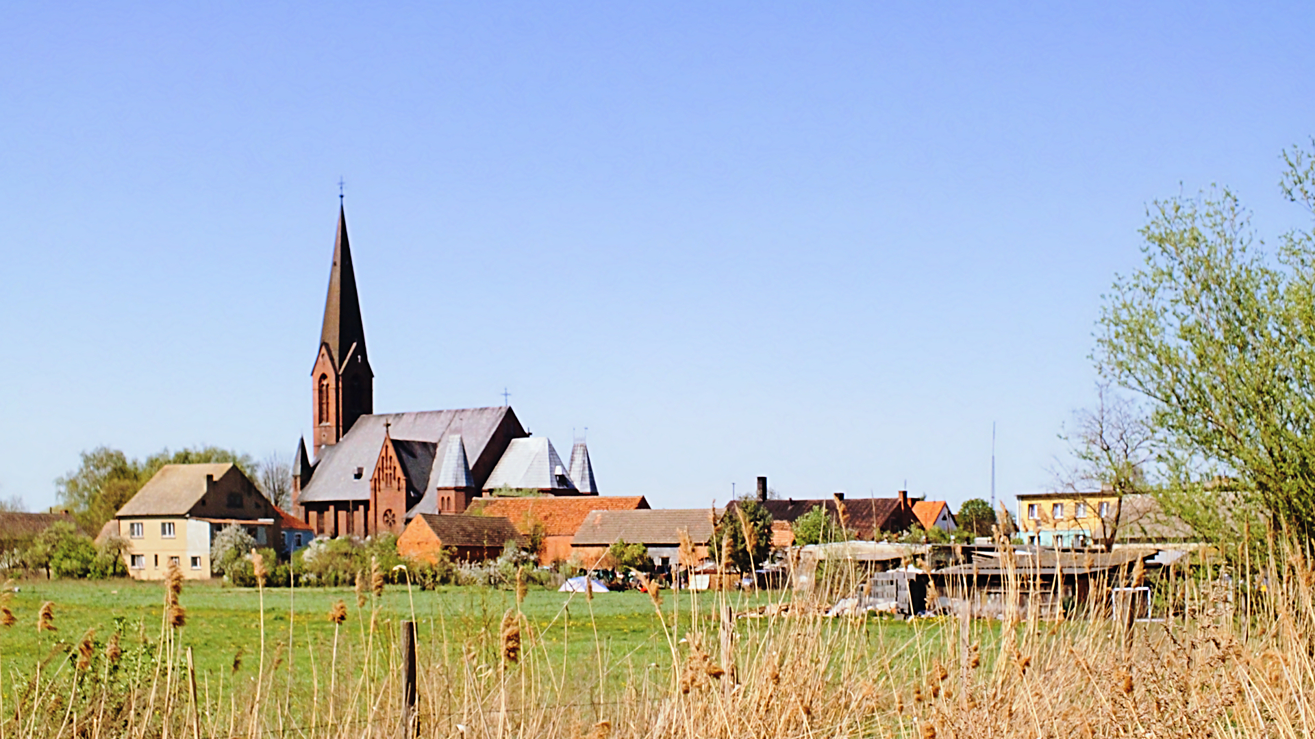 Gądkowice, widok od strony południowej (z szosy do Potaszni)